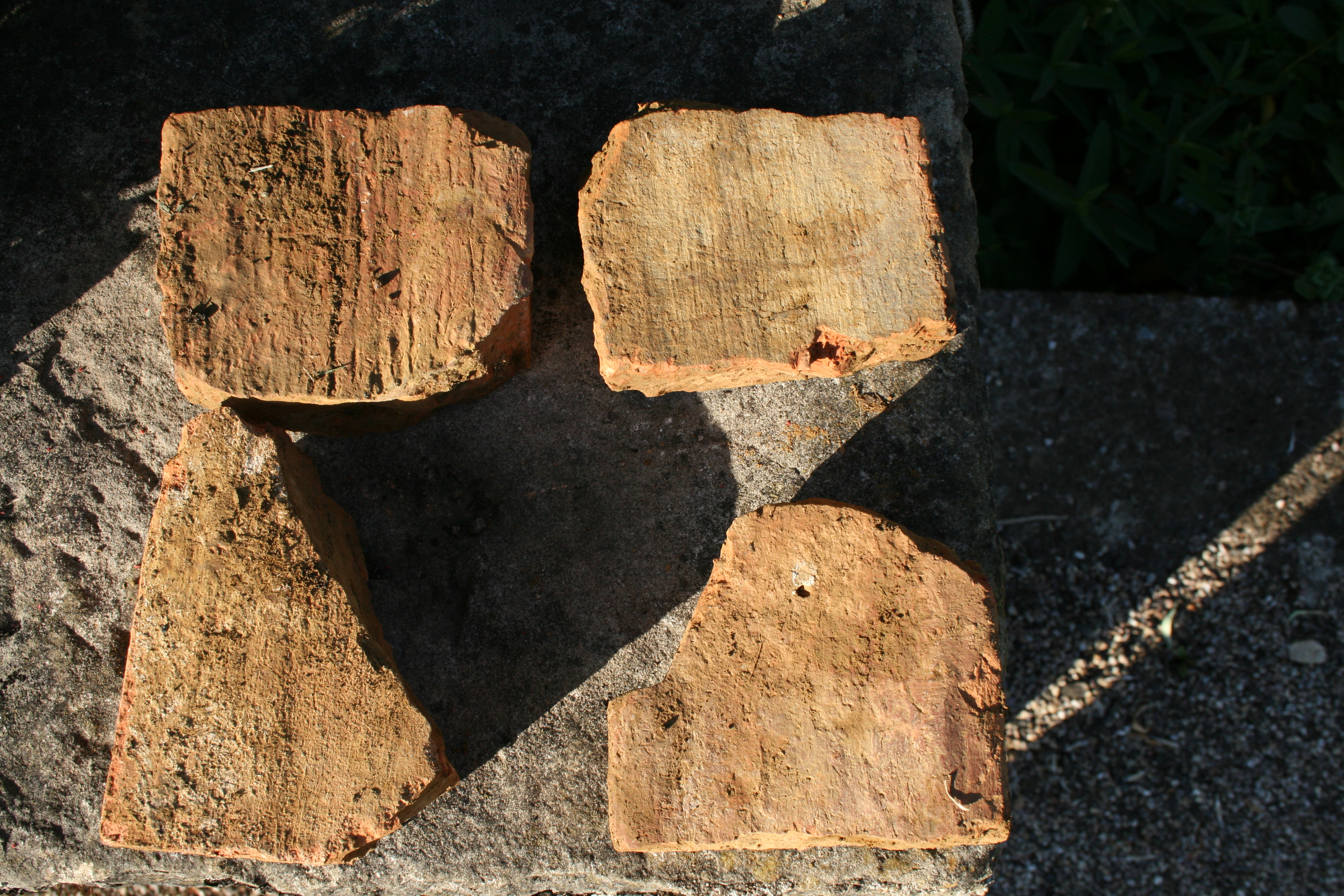 Borey ( Haute-Saône) Fragments de briques romaines